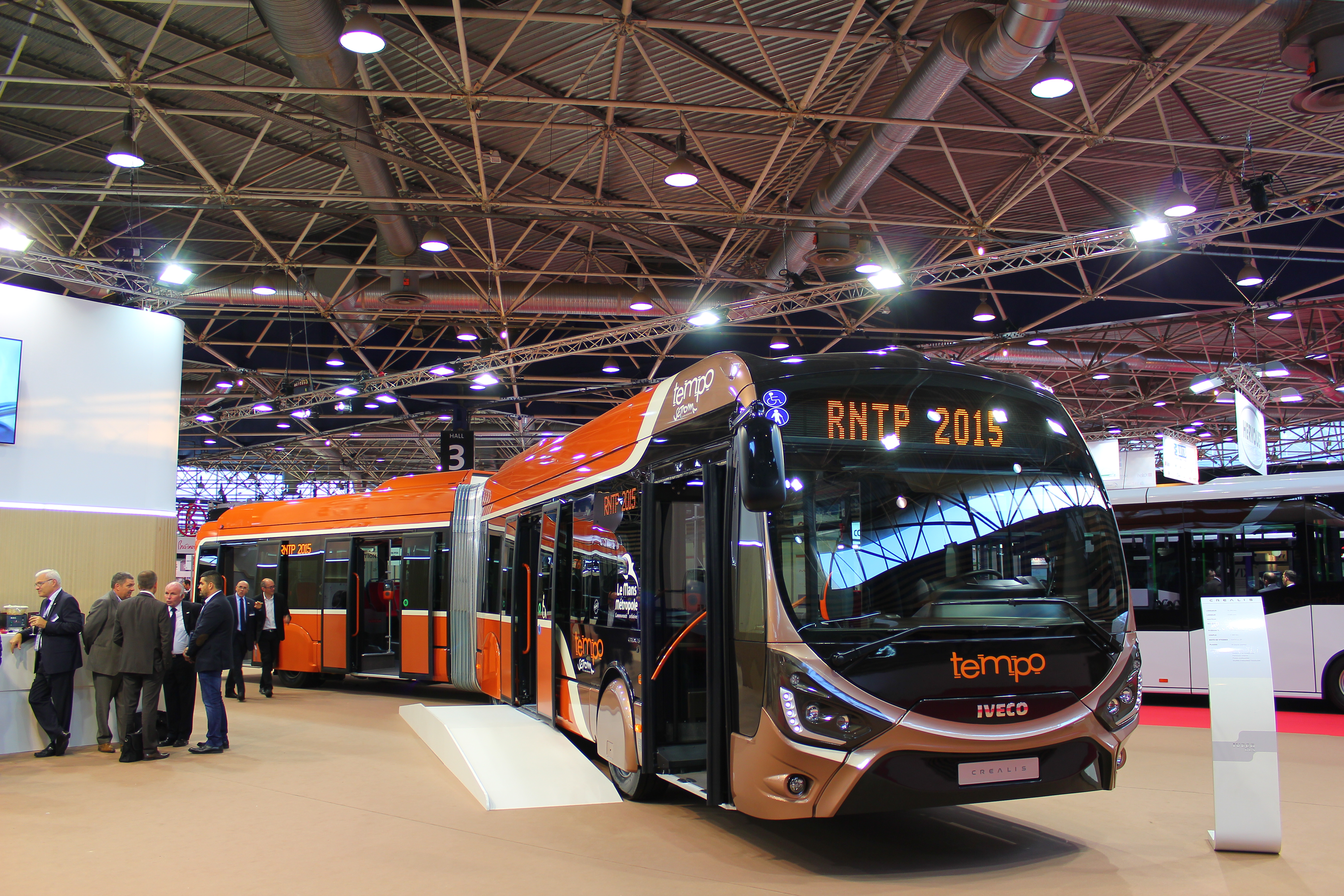 L'Iveco Bus Créalis 18 est présenté durant les 25èmes Rencontres Nationales du Transport Public